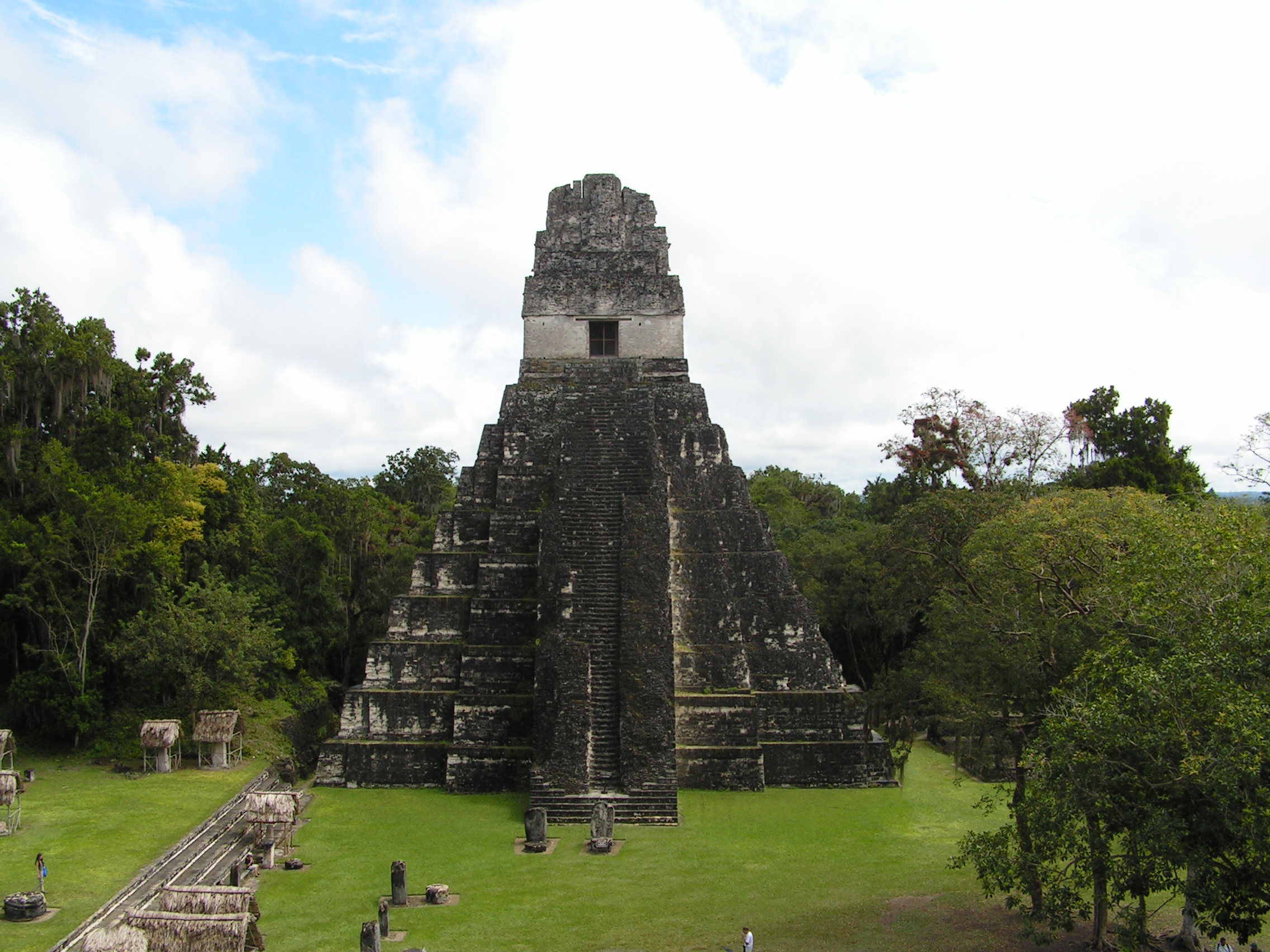 Tempel I in Tikal